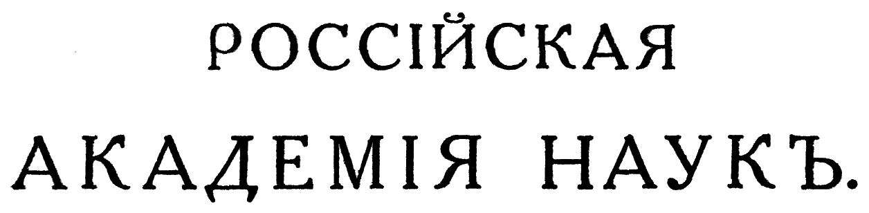 Бланк Российской академии наук. Петроград, 1917 год.